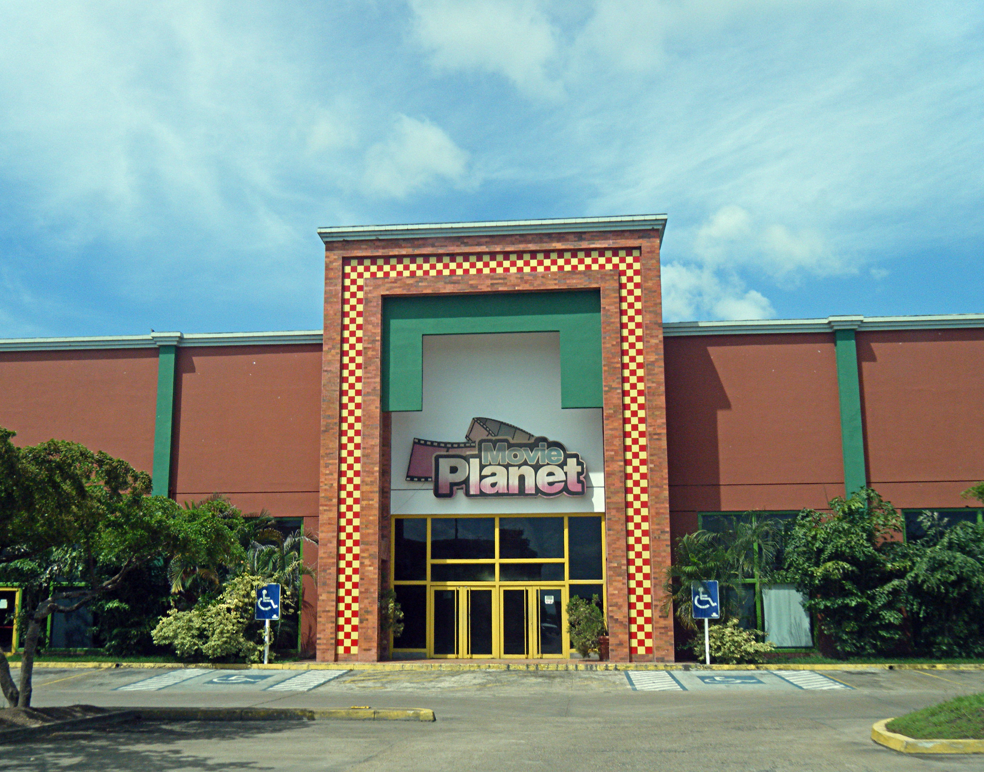 Cine Movie Planet del Centro Comercial La Cascada, Maturín, Monagas, Venezuela.